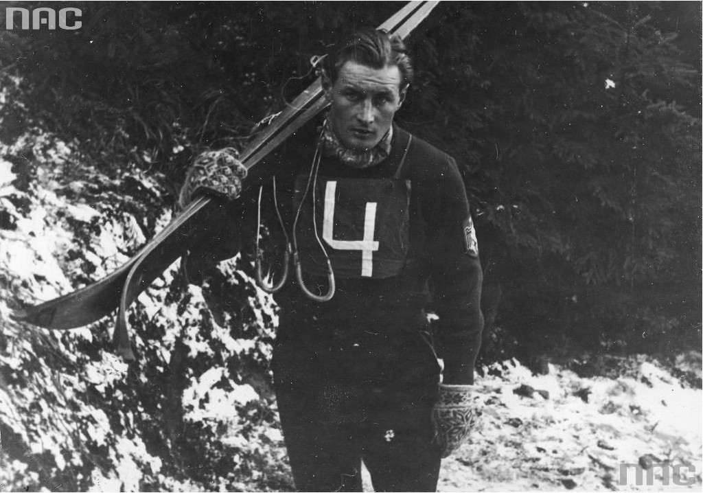 Christian Merz à Zakopane en 1939